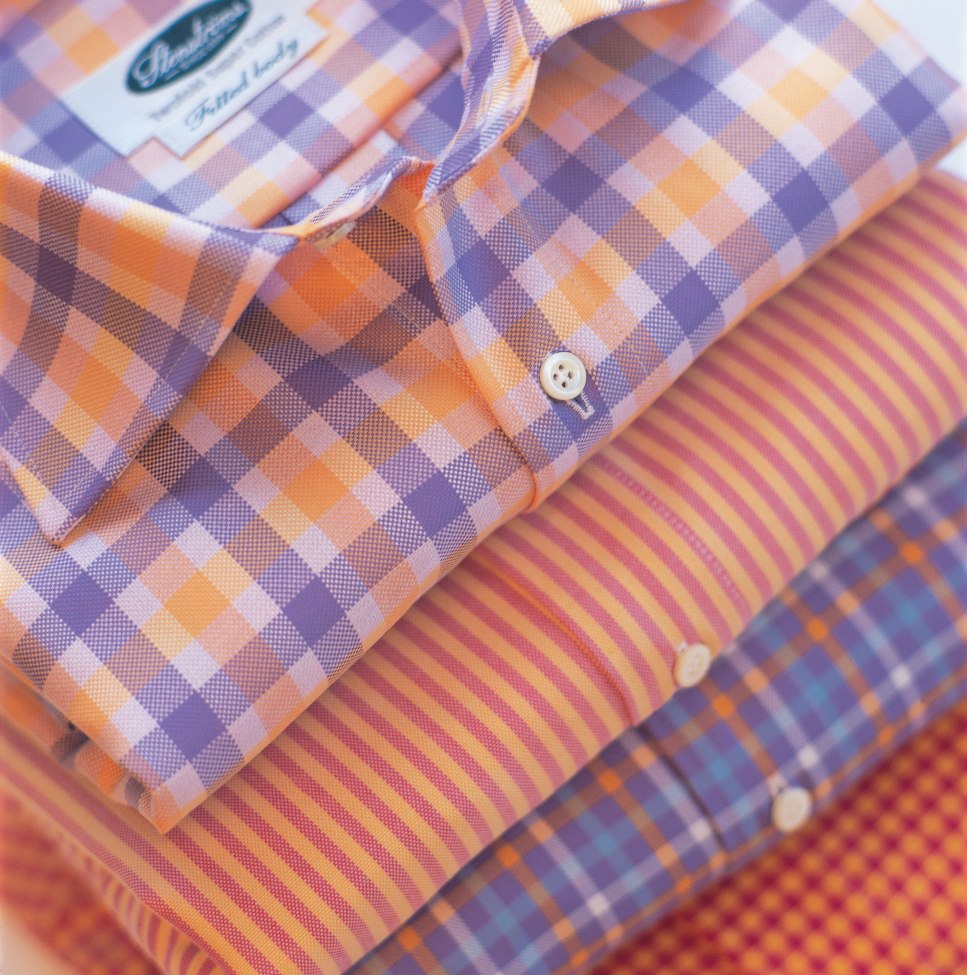 Stenströms shirts